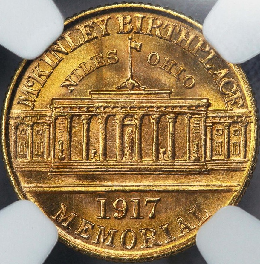 1917 McKinley dollar reverse.